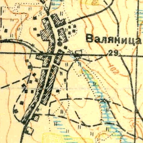 Топографическая карта Ленинградской области, квадрат О-35-9-Г-б (Вистина), деревня Валяницы